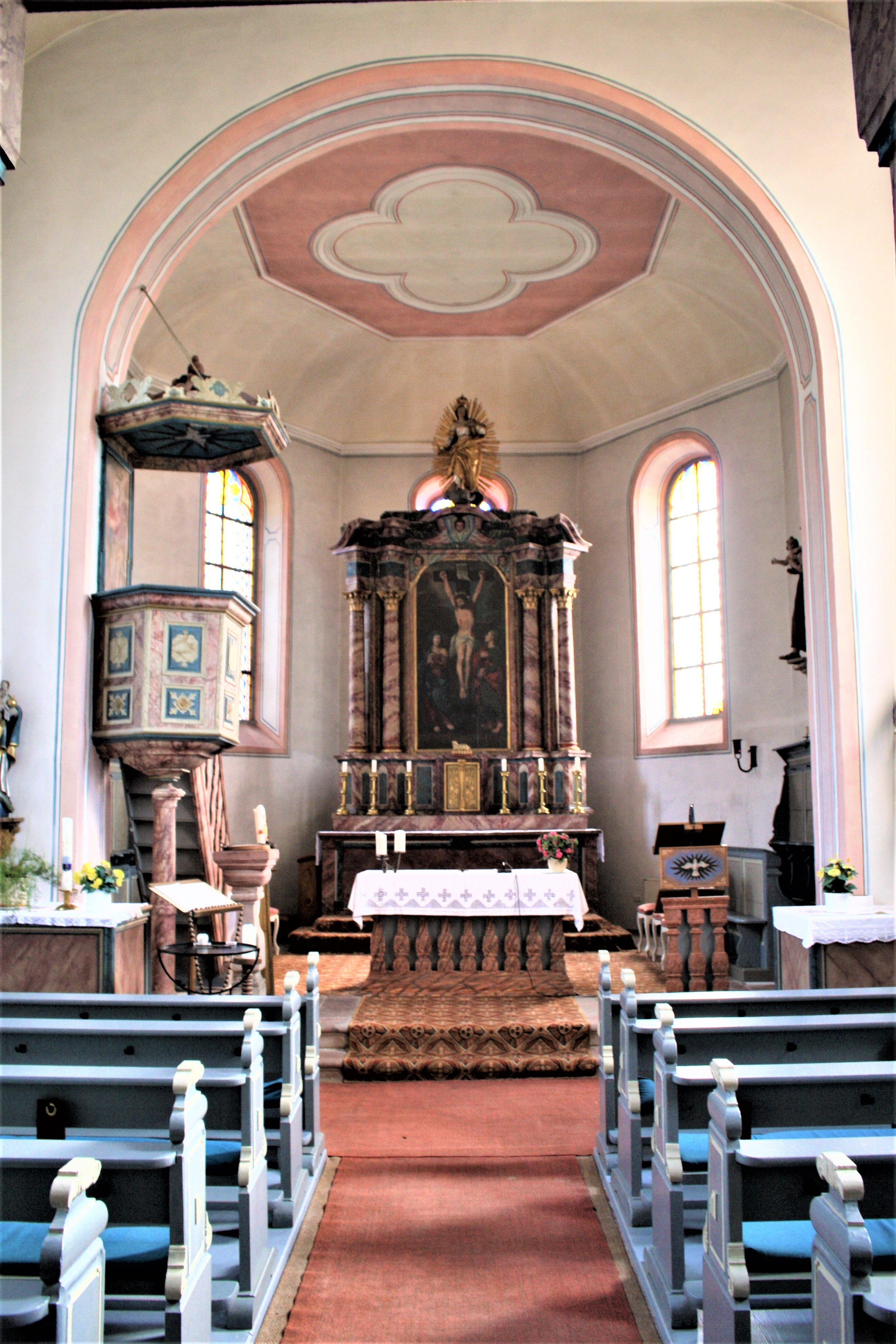 Chorraum der kath. Kirche St.Nikolaus, Espenschied ein Stadtteil von Lorch, Rheingau